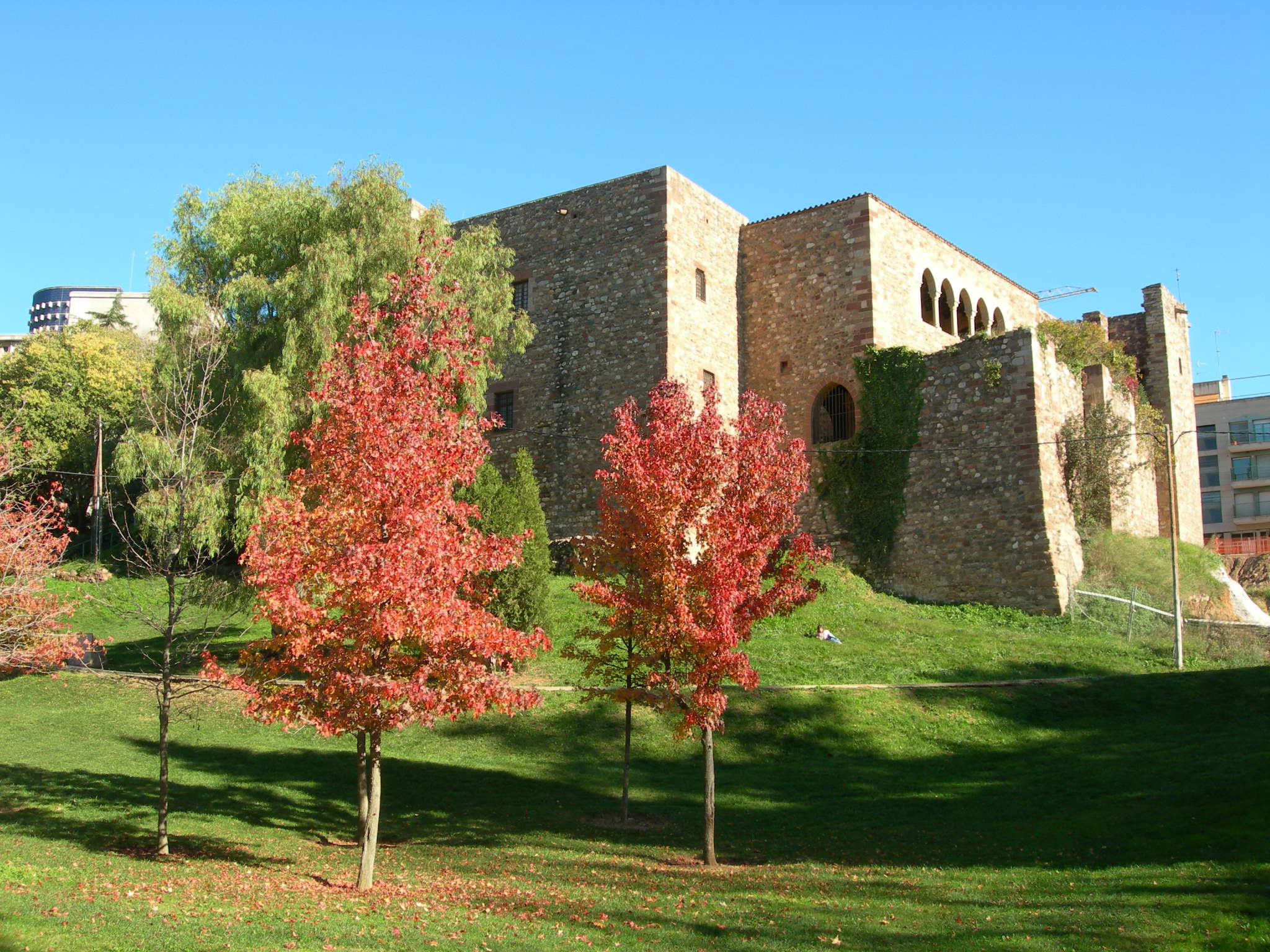 Castell cartoixa de Vallparadís (Terrassa)